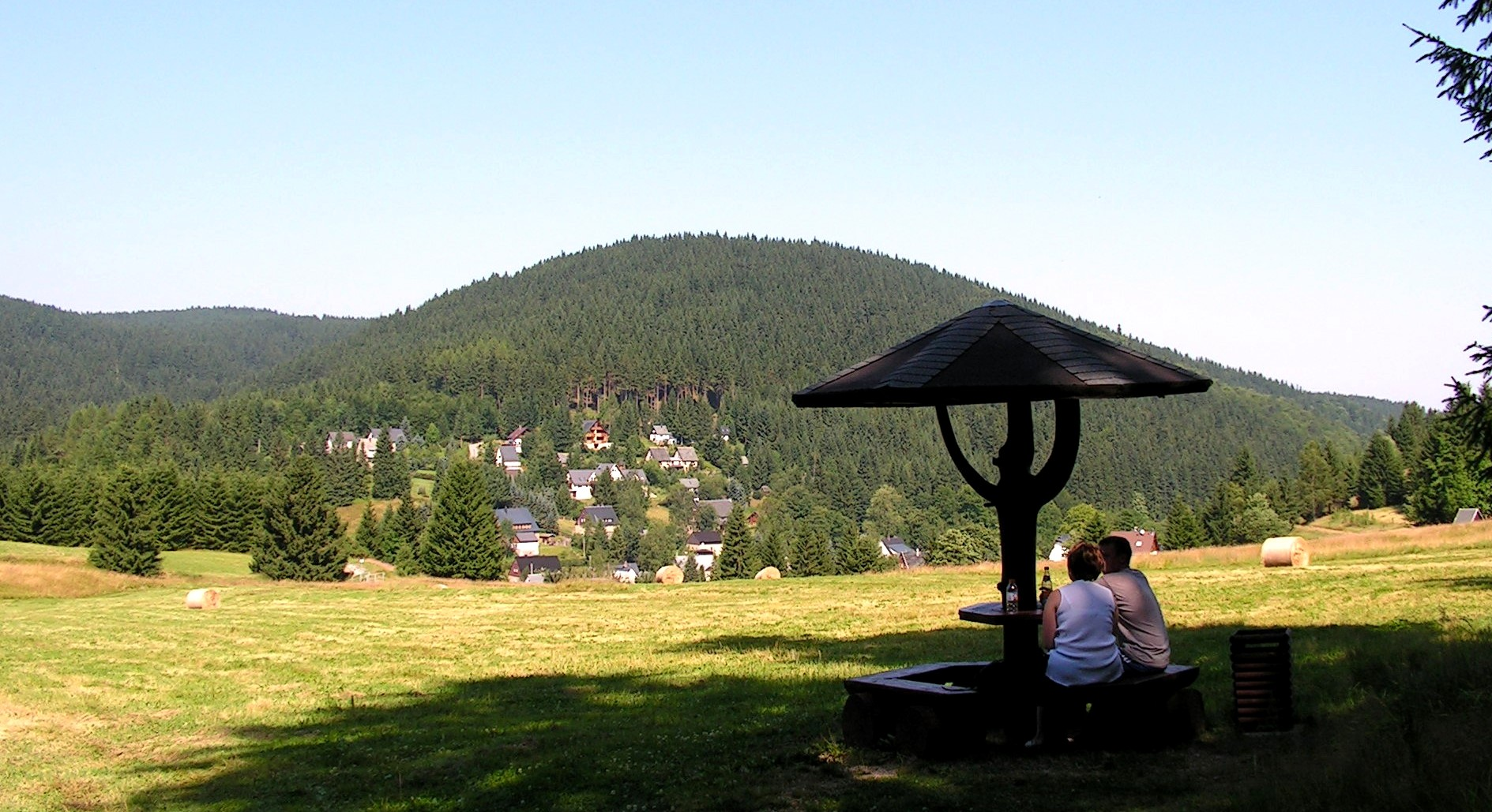 Kammweg - Rastplatz in Wildenthal (Eibenstock)